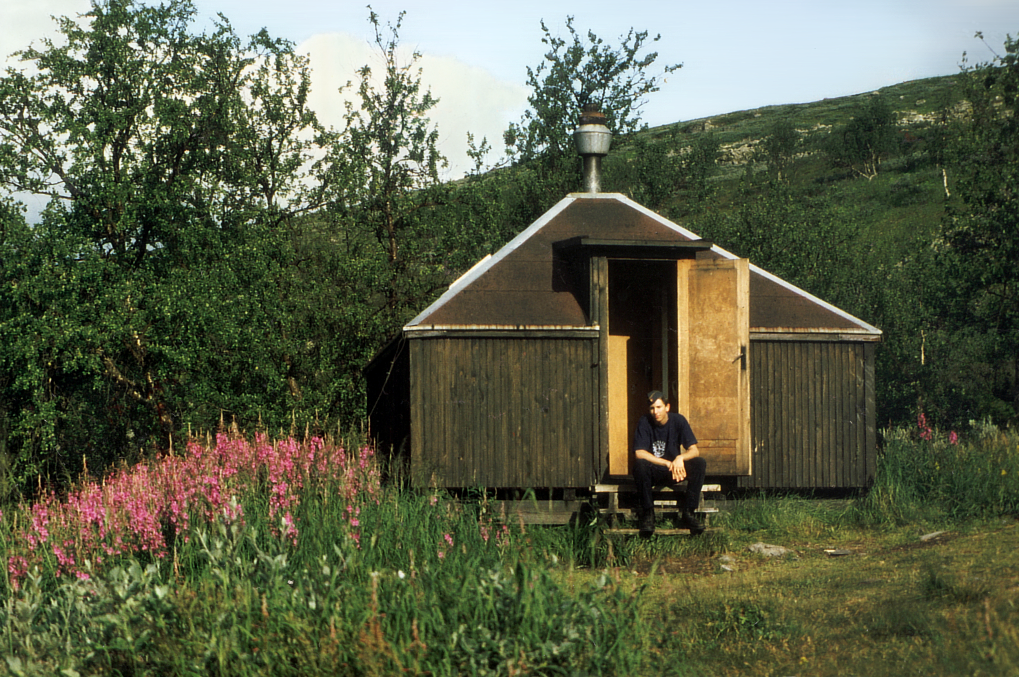 Nordlandfahrt des Pfadfinderstammes Ägypten (Trupp Penzberg) vom 29.07. bis 21.08.1994 nach Schweden und Norwegen. Ausgangspunkt dieser Erkundung entlang des Kungsleden war am 2. August 1994 die Fjällstation Kvikkjokk. Im Bild: Vor der Rittak-Schutzhütte.